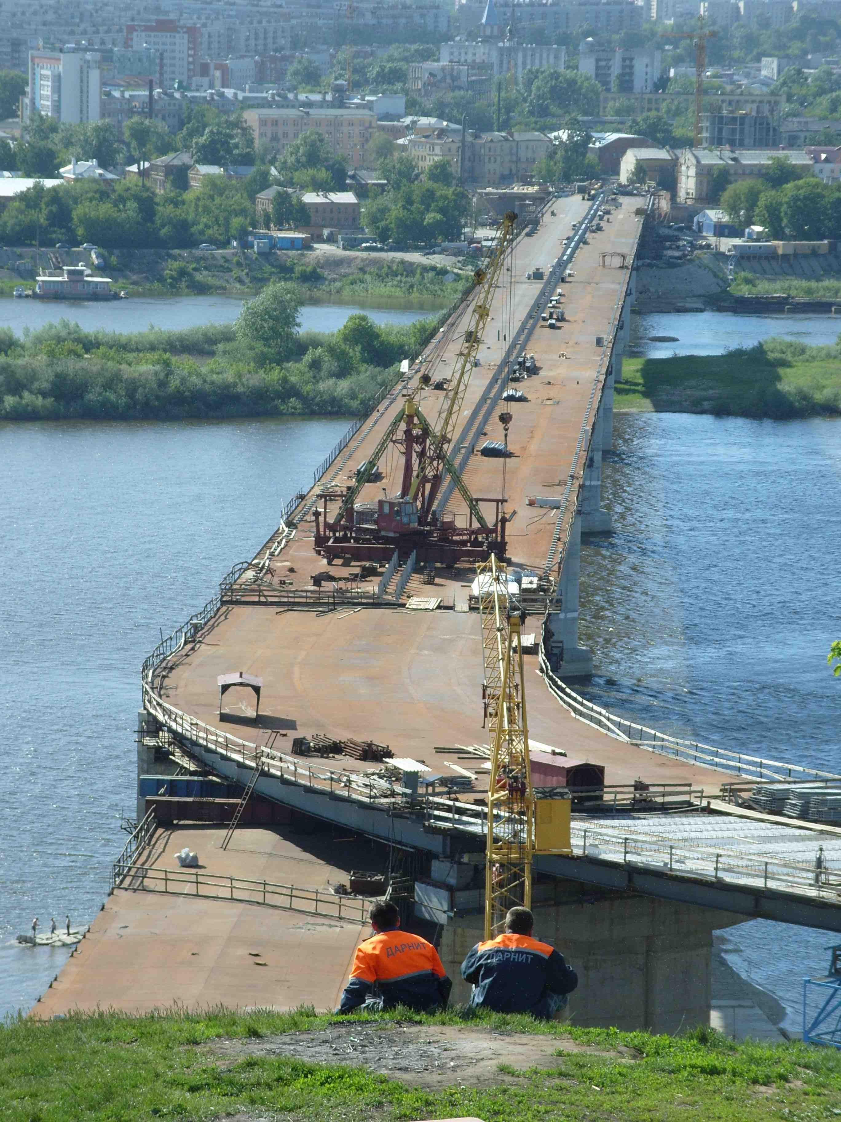 Работы на метромосту в Нижнем Новгороде